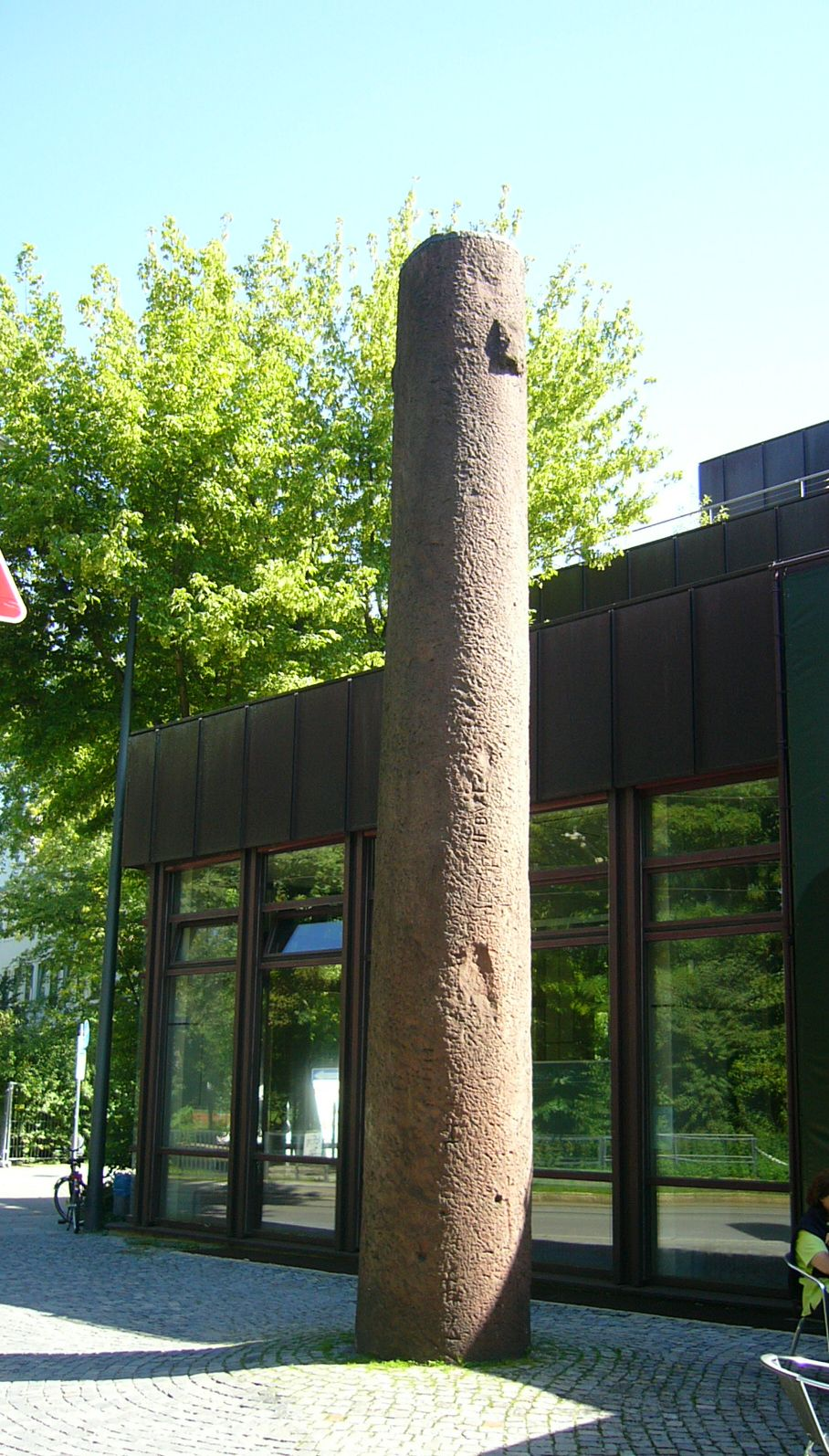 Monolith (seit etwa dem 18. Jhd. als „Heunensäule“ bezeichnet) vor der Archäologische Staatssammlung München aus dem 11. Jahrhundert. Der Monolith wurde 1879 vom Magistrat der Stadt Miltenberg (Bayern) an das Bayerische Nationalmuseum übergeben. Es enthält zahlreiche Steinmetz- und Besucherzeichen und hat eine Höhe von 749 cm und ein Gewicht von 14,5 Tonnen. Der Monolith befindet sich seit 1975 vor der Archäologischen Staatssammlung.